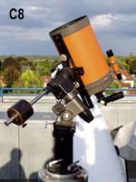 Das C8-Reflektor-Teleskop (Hersteller Celestron) der Sternwarte Heilbronn